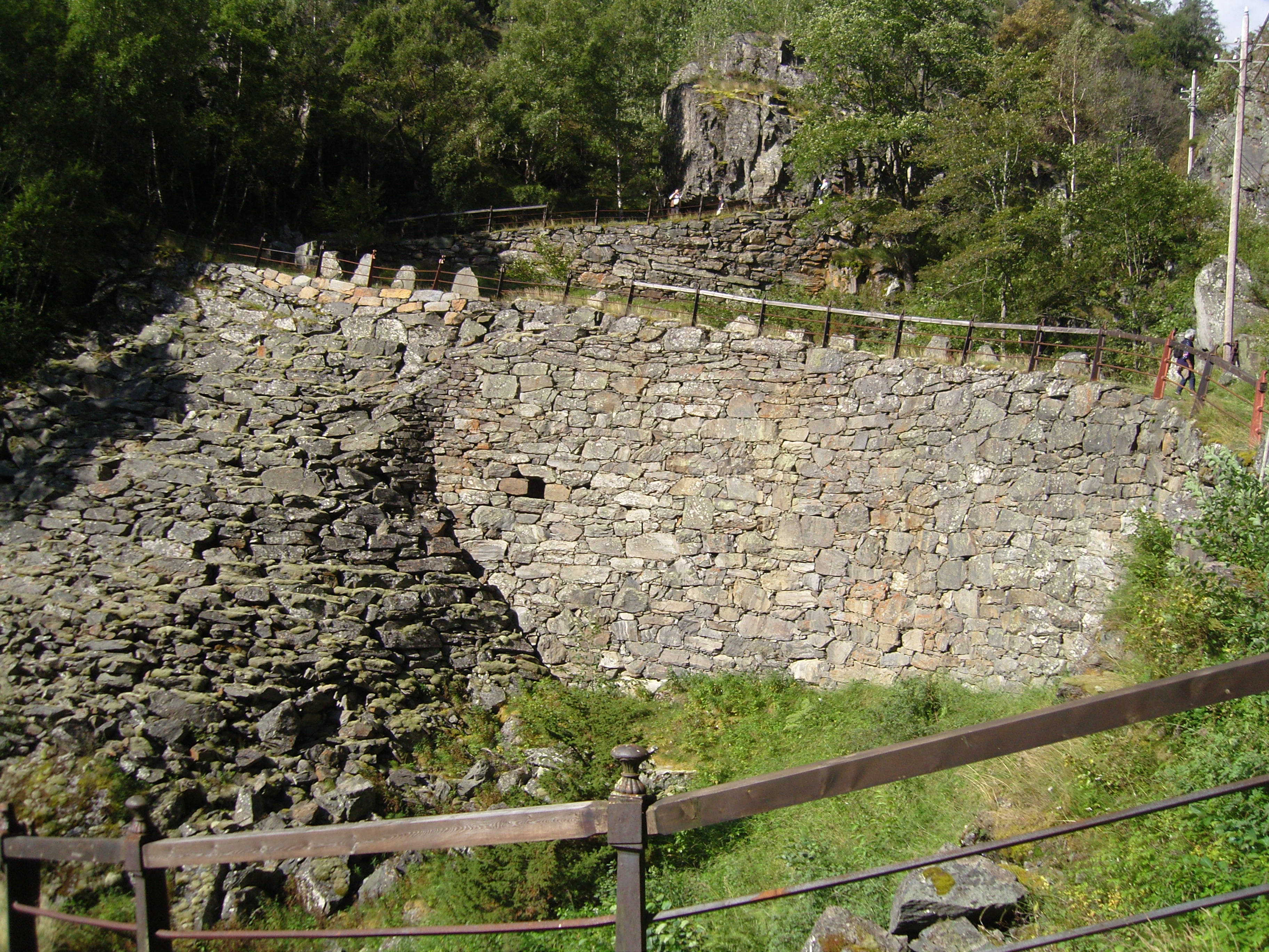 Vindhellavegen, Lærdal, Norge